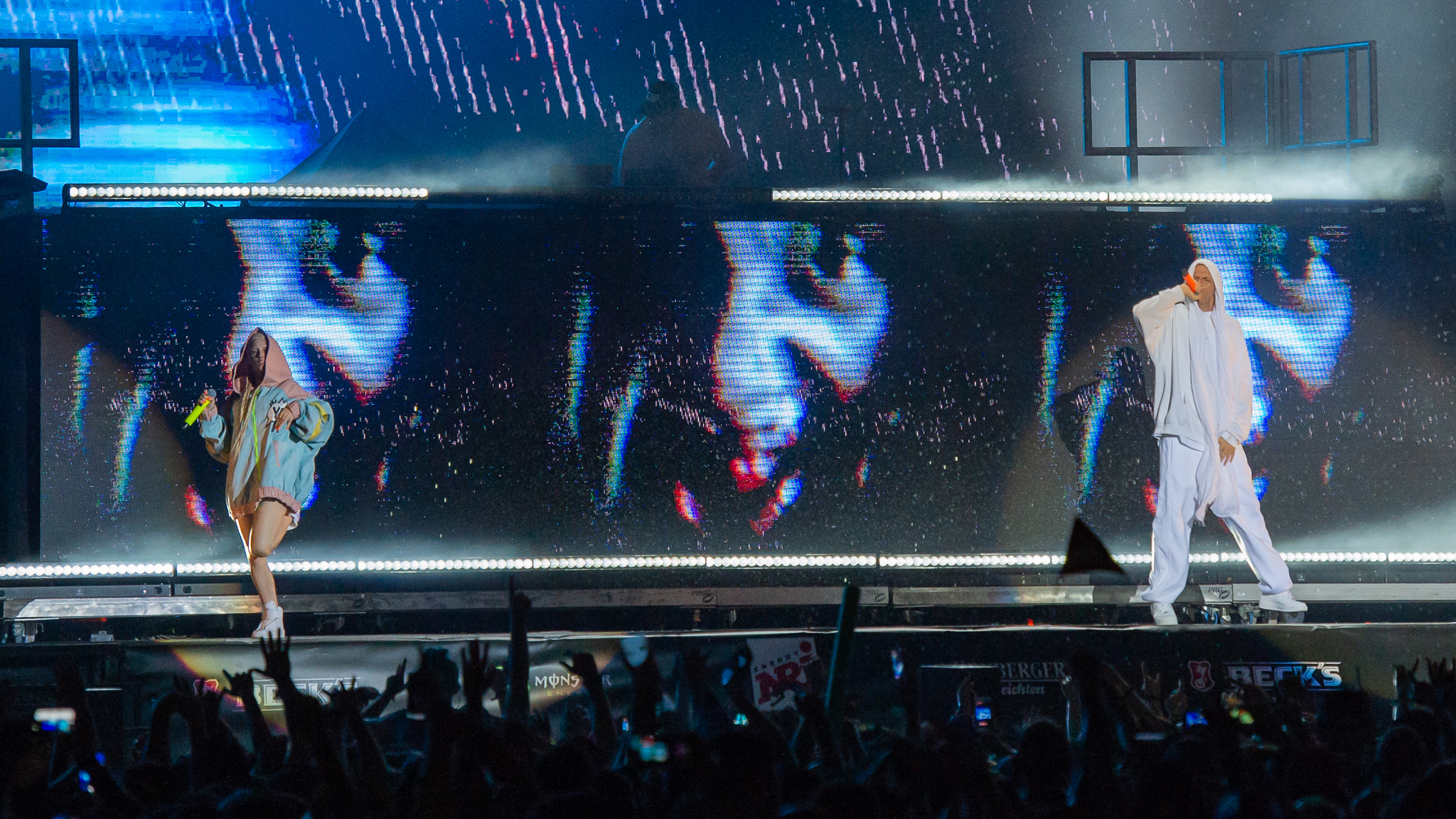 ARGO-Konzerte,Anri du Toit,Beck's Park Stage,Die Antwoord,Konzert,Livekonzert,Livemusik,Musik,Ninja,RiP,Rock im Park 2019,Watkin Tudor Jones,Yolandi Visser